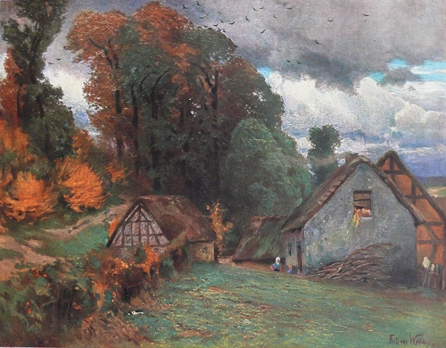 Alte Häuser am Waldrand (Dorf Schoenbach). Öl auf Leinwand, 81 x 105 cm